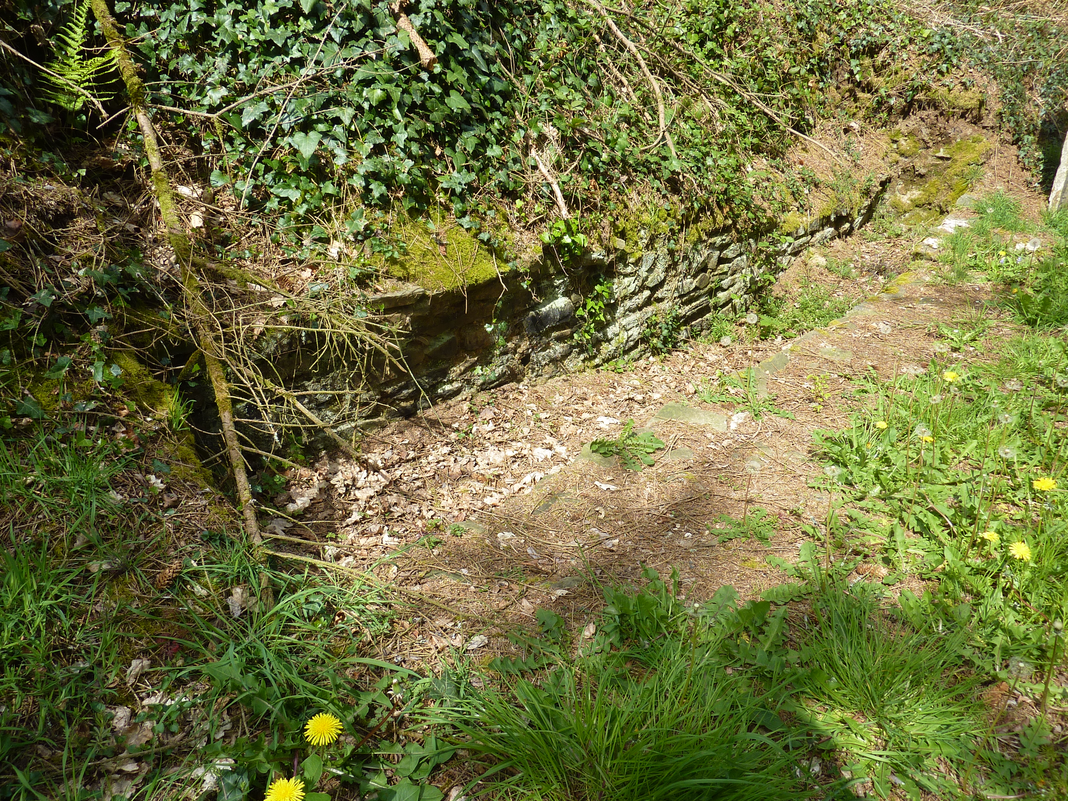 Vestiges de l'aqueduc gallo-romain desservant Vorgium (Carhaix) au Dourbont en Le Moustoir (Côtes-d'Armor).